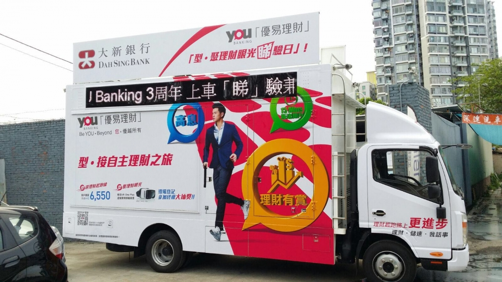 粵語: 香港街道上，配有LED的流動廣告車